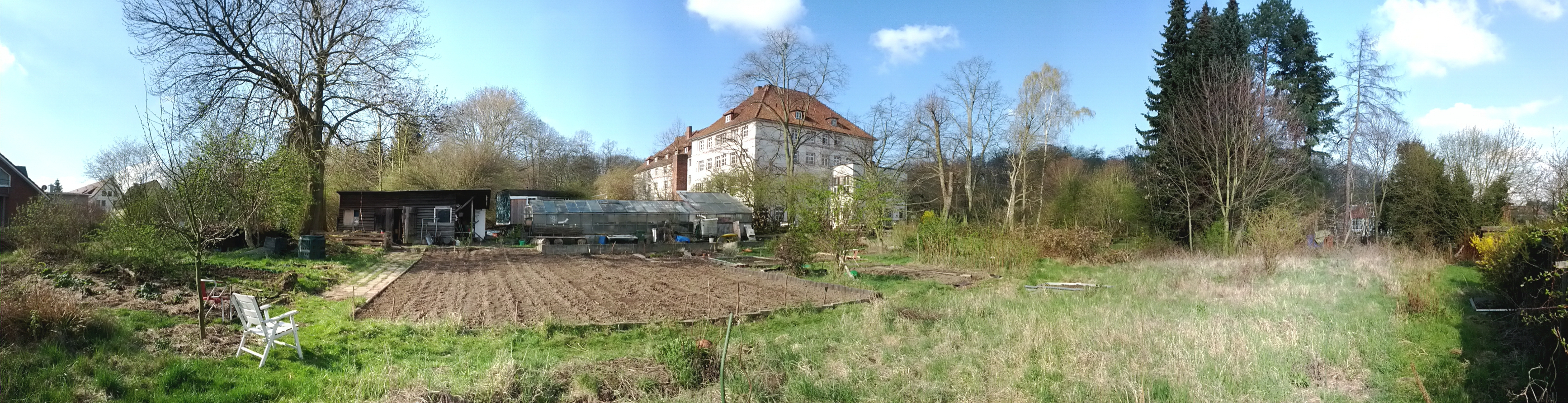 Trillke-Gut Hildesheim im April 2012 aus Sicht des Gemüsegartens